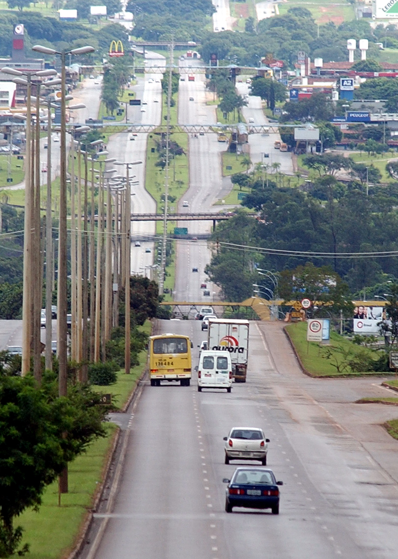 A rodovia federal brasileira BR-450 em Candangolândia, DF, Brasil